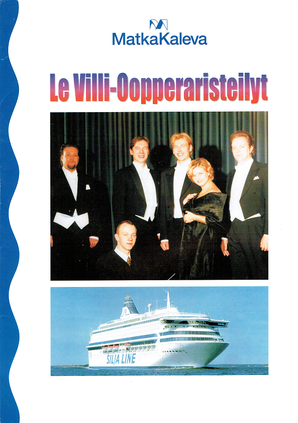 Koulutusesite